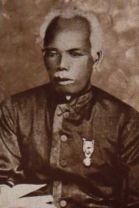 พระยาศรีสุนทรโวหาร (น้อย อาจารยางกูร)